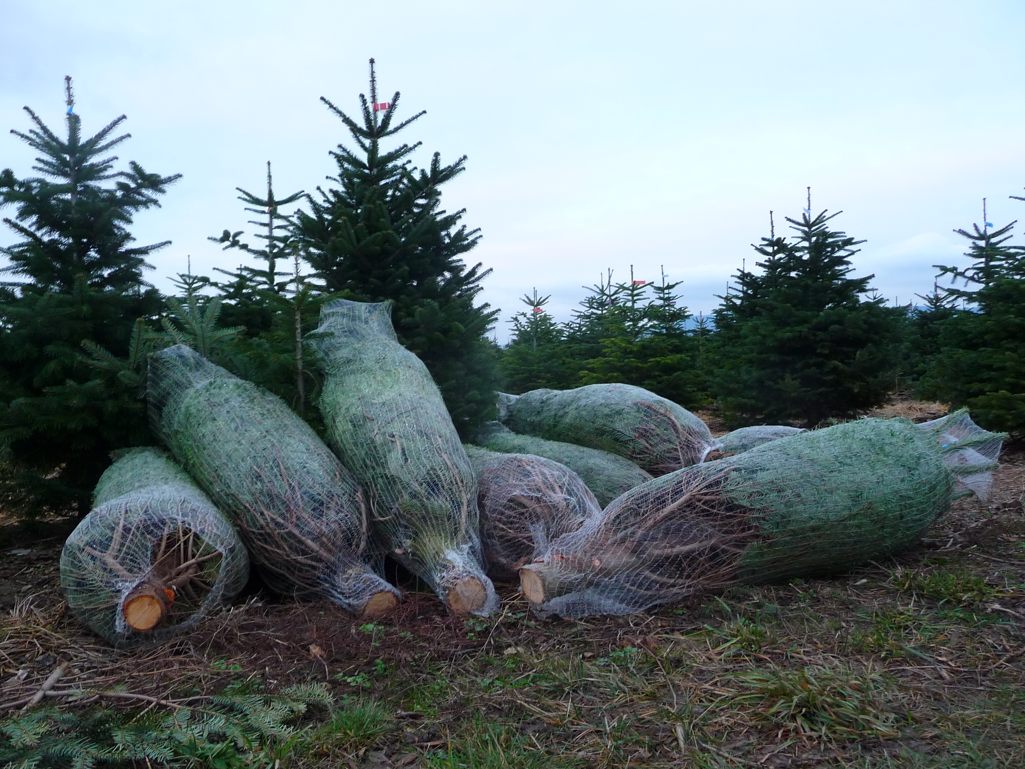 Geschlagene und zum Transport verpackte Nordmanntannen (Abies nordmanniana) auf einer Weihnachtsbaumfarm in Nordbaden (Baden-Württemberg, Deutschland)